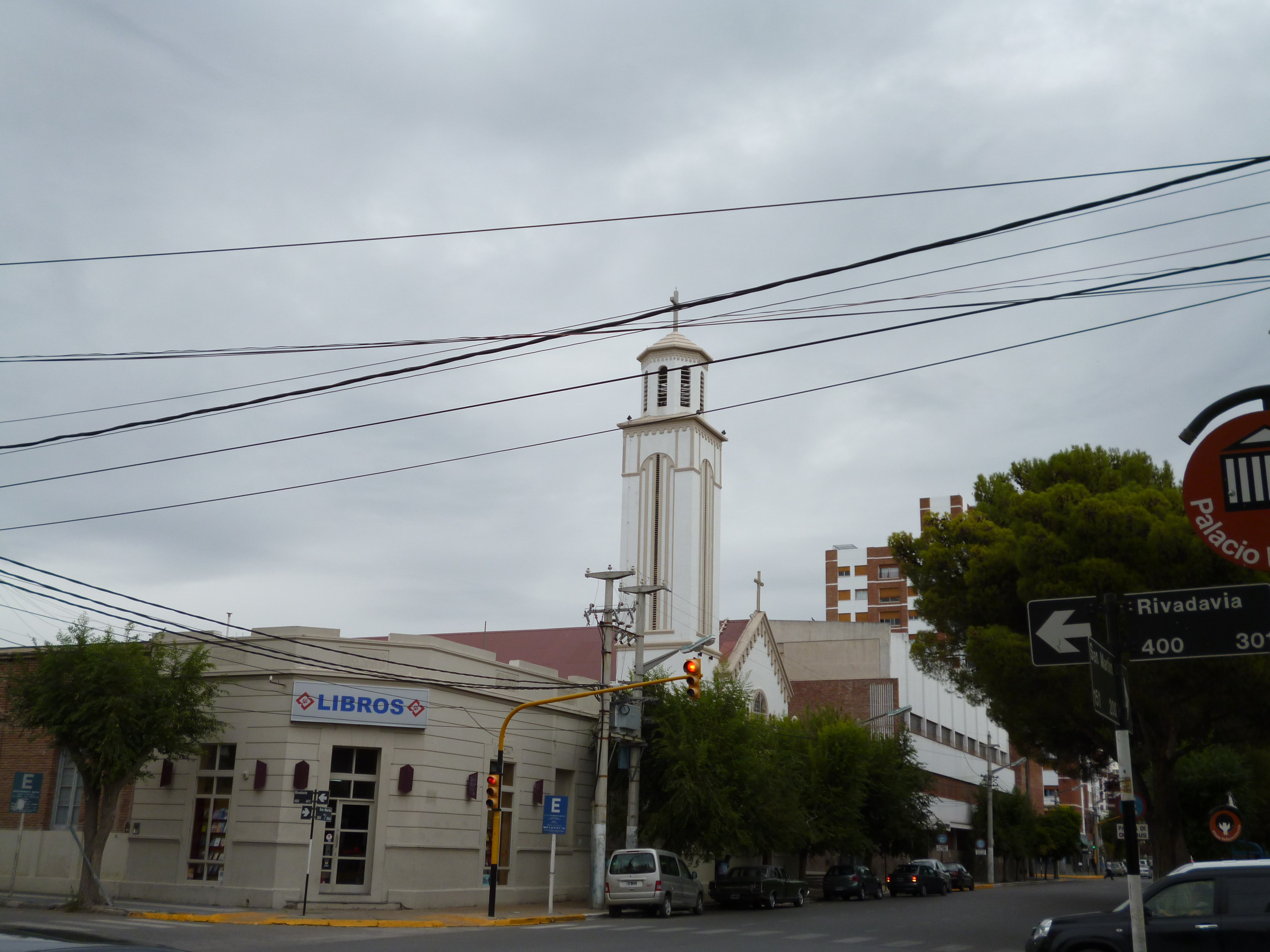 Vista de la iglesia vieja (en la esquina) y la actual